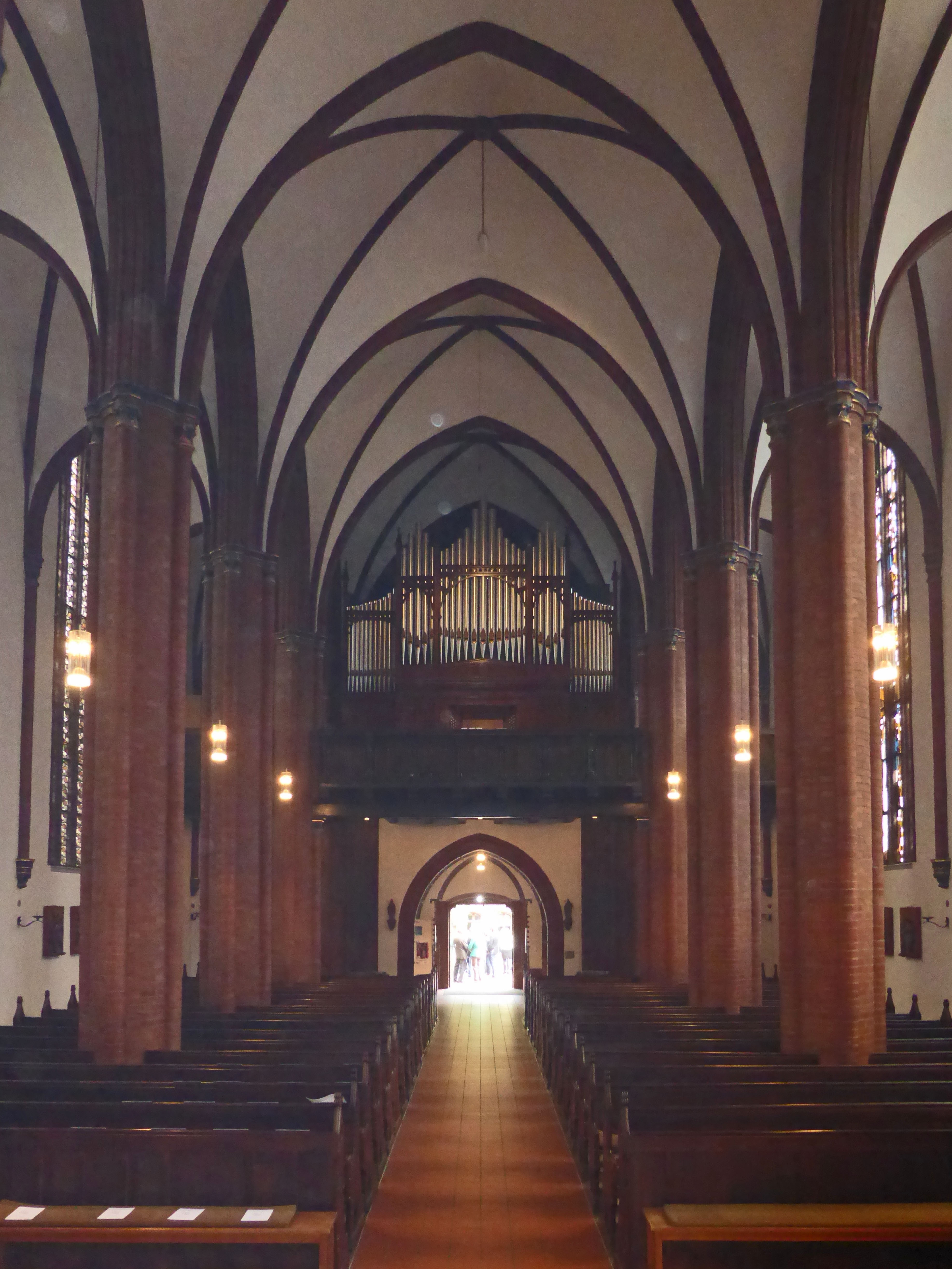 Katholische Hl.-Engel-Kirche in Peine.